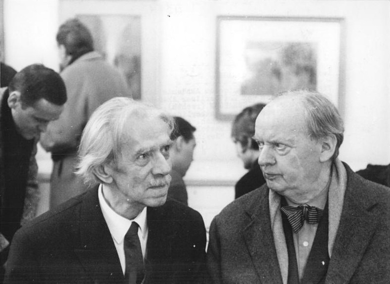 Berlin, Otto Nagel-Ausstellung, Scharoun Zentralbild ZB 24.3.1966 Zwischen Prof. Otto Nagel, Vizepräsident der Deutschen Akademie der Künste, und dem Präsidenten der Westberliner Akademie der Künste, Prof. Dr. h.o. Hans Scharoun (rechts), kam es am 23.3.1966 in der Westberliner Ladengalerie zu einem herzlichen Gespräch. Anlaß war die Eröffnung der zweiten Ausstellung mit Werken Otto Nagels unter dem Thema "Berliner Bilder". Abgebildete Personen: Nagel, Otto Prof.: Maler, Präsident der Akademie der Künste (AdK), Nationalpreisträger, Vaterländischer Verdienstorden (VVO) in Gold, DDR (GND 118586300) Scharoun, Hans Prof. Dr.: Präsident der Akademie der Künste in Berlin-West, Bundesrepublik Deutschland (GND 118606565)